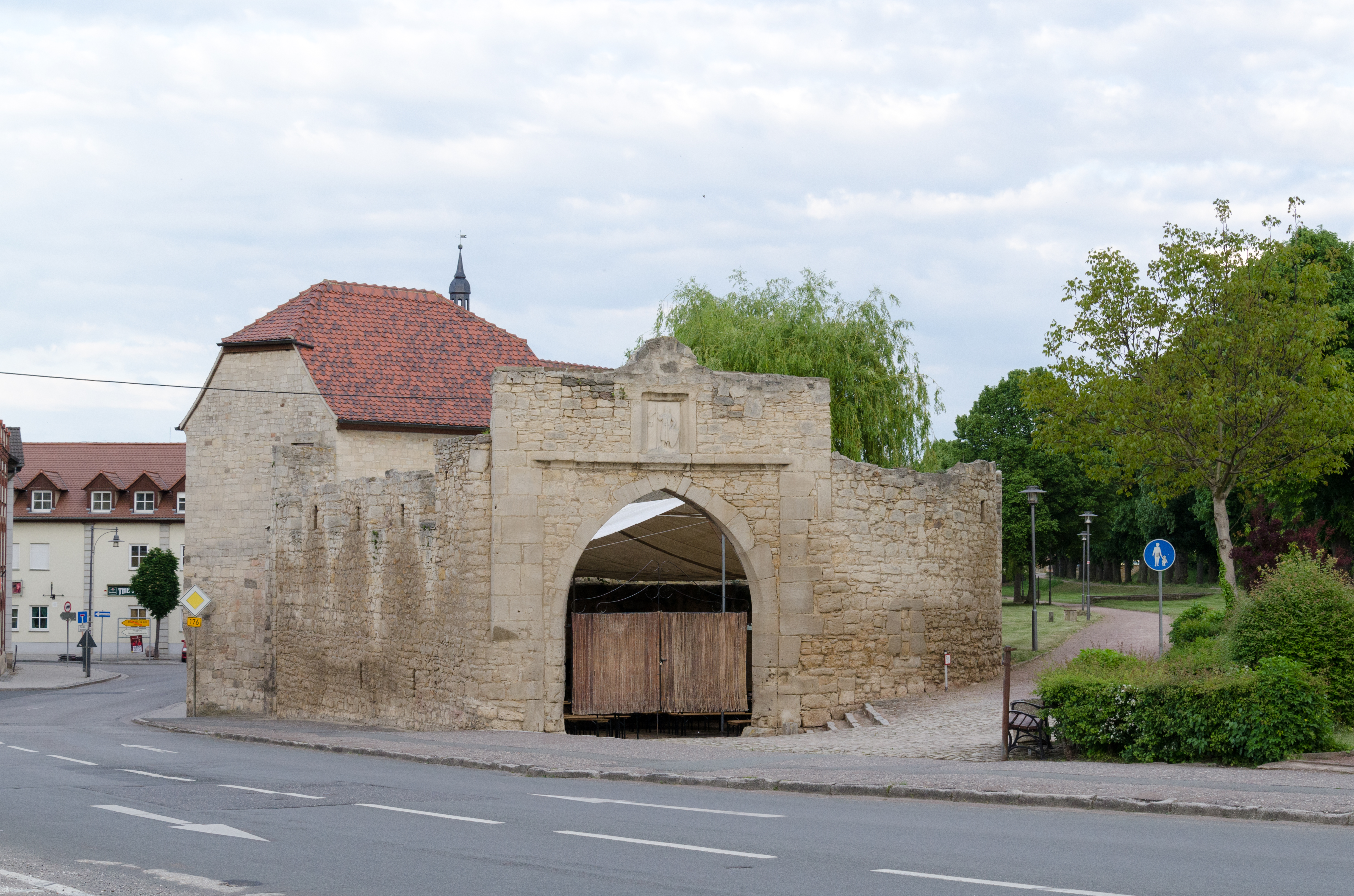 Laucha an der Unstrut, Stadtbefestigung, Oberes Tor